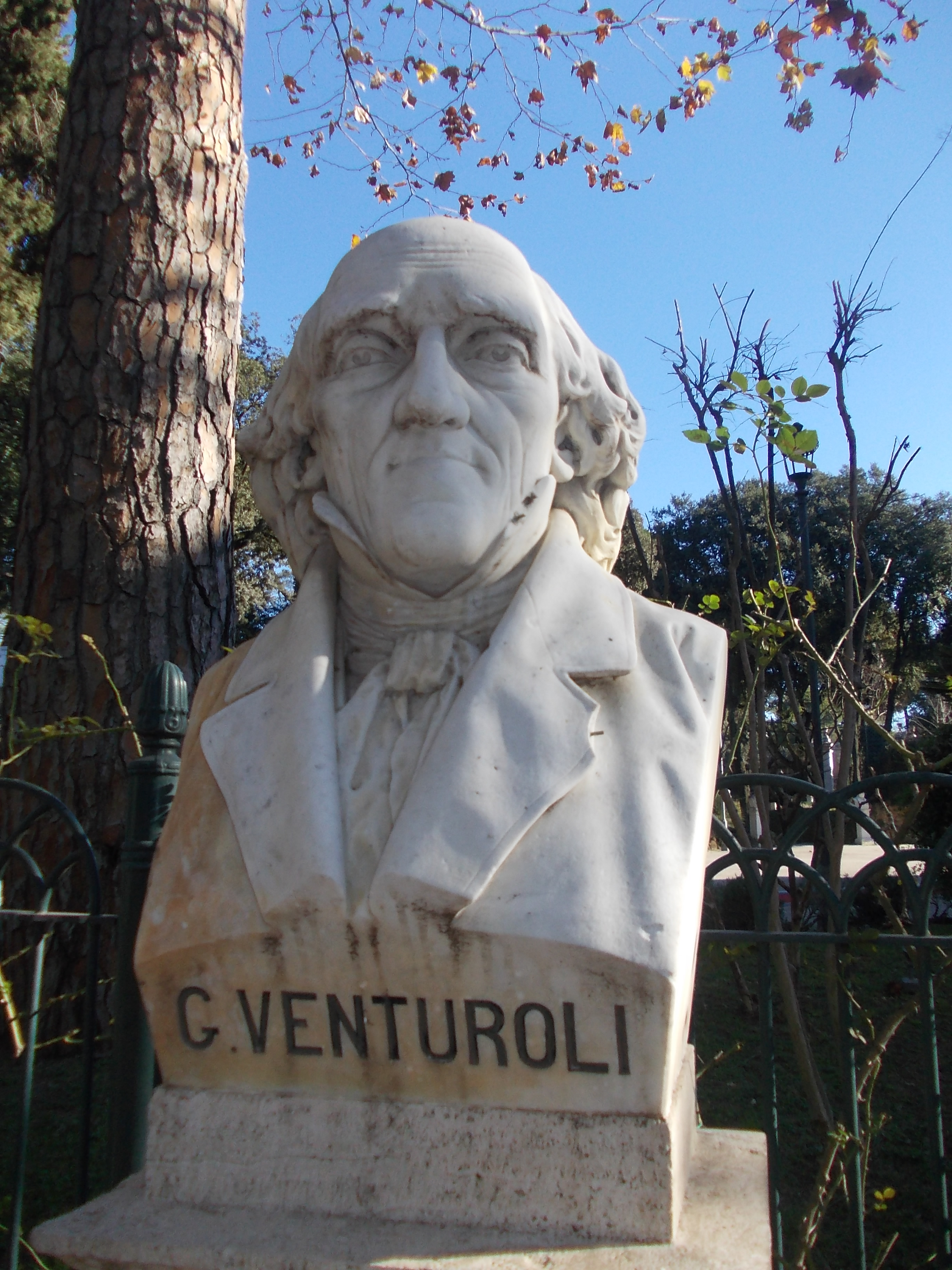 Busto in marmo dell'ingegnere italiano Giuseppe Venturoli al Pincio, Roma